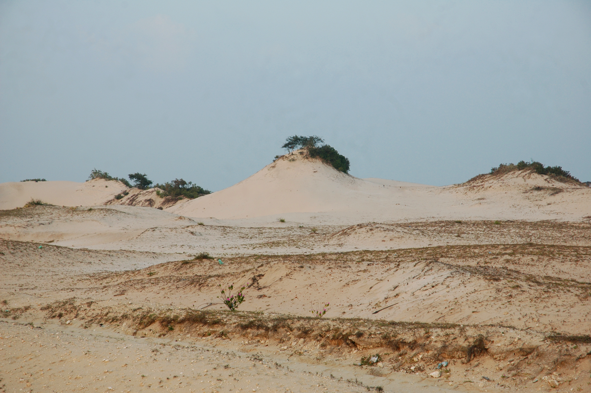 குடத்தனை - மணற்குண்று